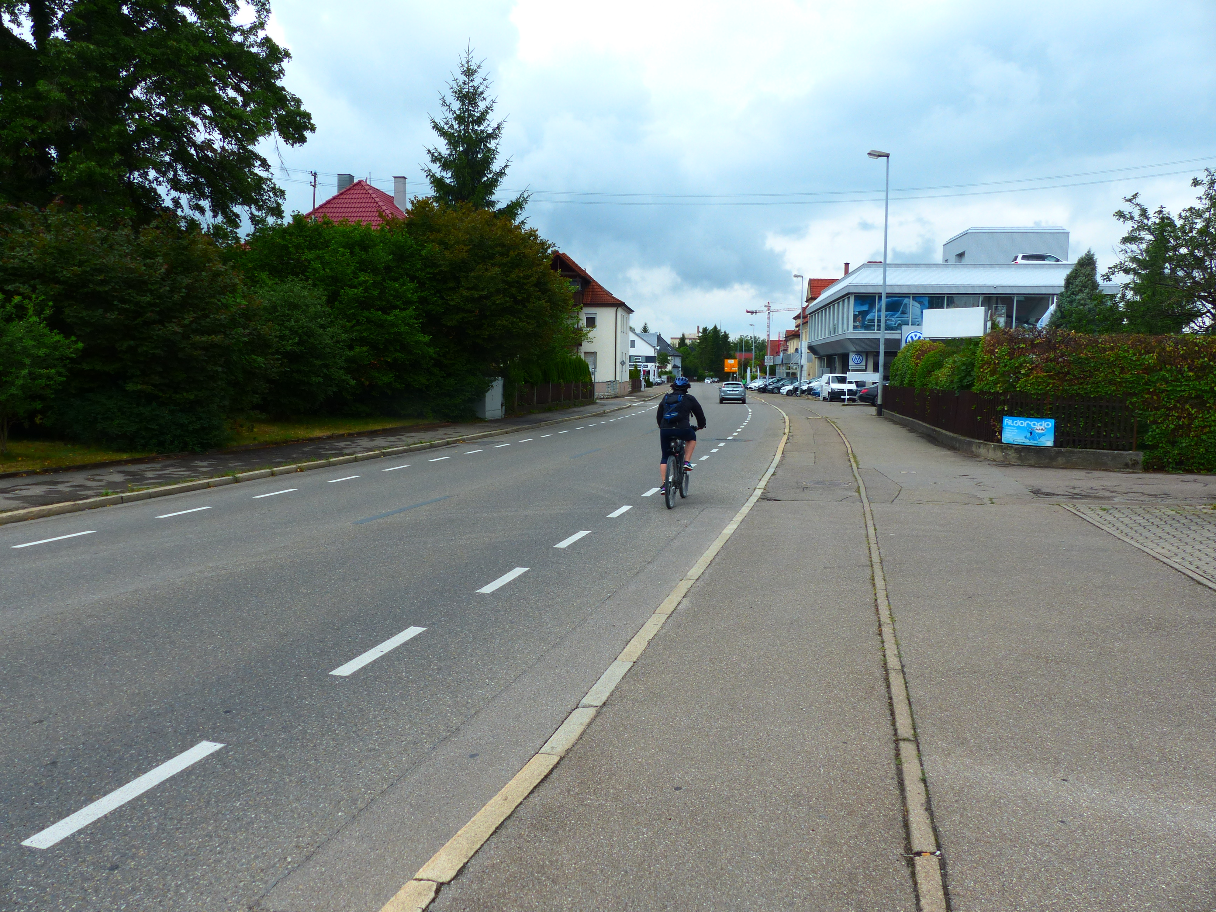 Neuer Schutzstreifen neben altem, nicht mehr benutzungspflichtigen Radweg